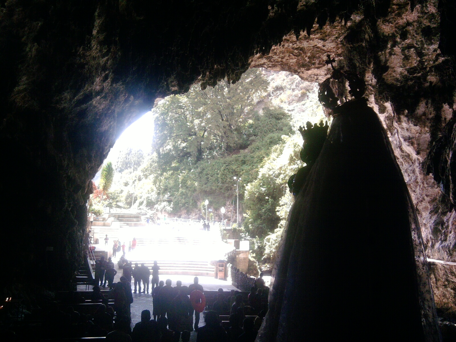 Este maravilloso lugar, es uno de los sitios más representativos religiosos del Cantón Montúfar.